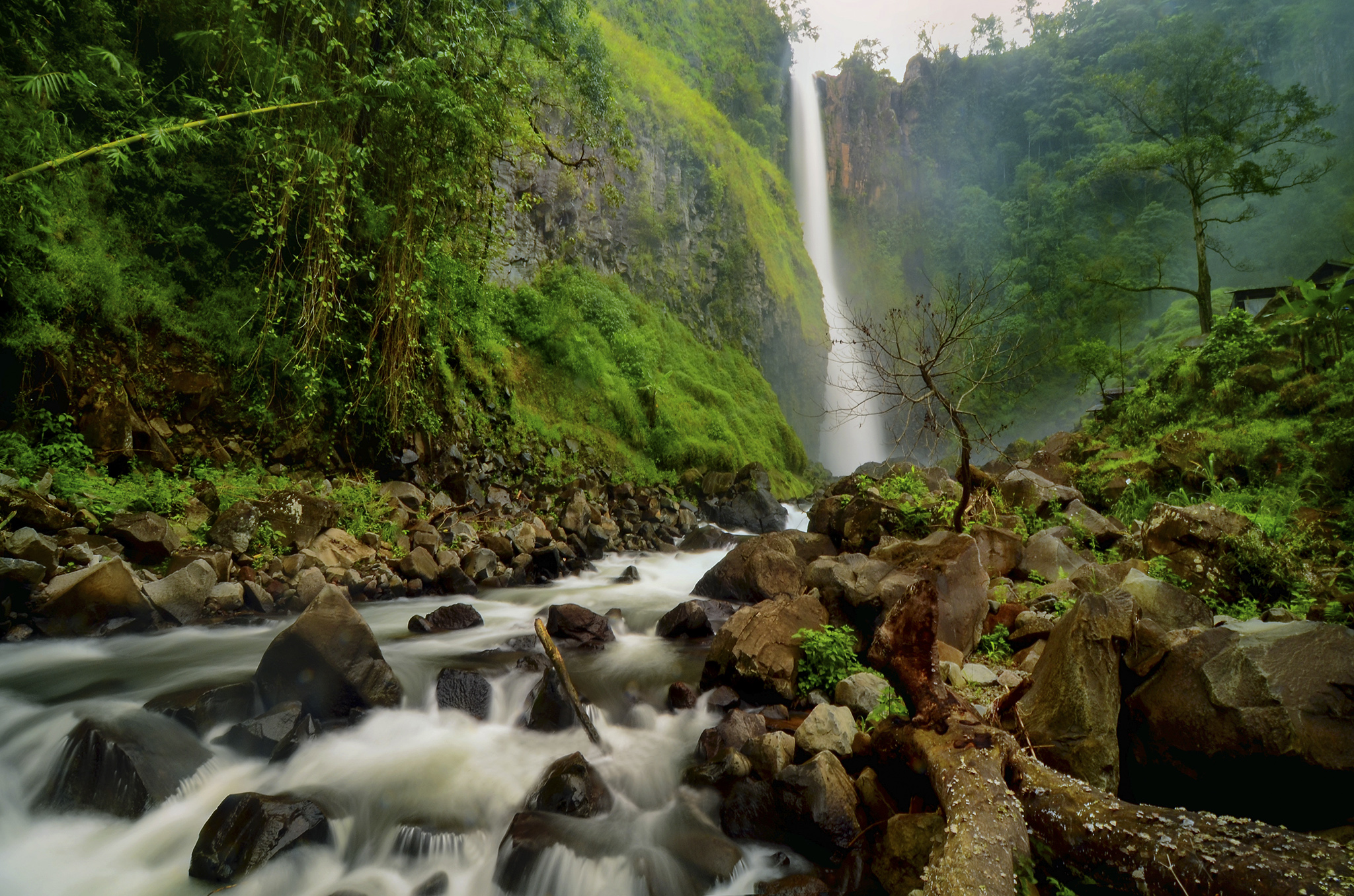 Malino Waterfall, merupakan air terjun tertinggi di provinsi sulawesi selatan, air terjun yang memiliki tinggi mencapai 75meter terletak di kabupaten malino-indonesia